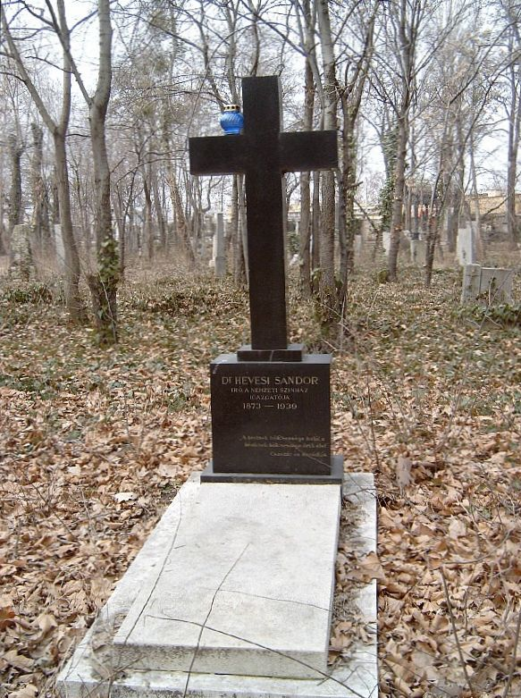 Dr. Hevesi Sándor (Hoffmann Sándor) (1873. május 3. Nagykanizsa - 1939. szeptember 8. Budapest) rendező, színházigazgató, kritikus, író, műfordító sírja Budapesten. Kerepesi temető: 41/1-1-23.